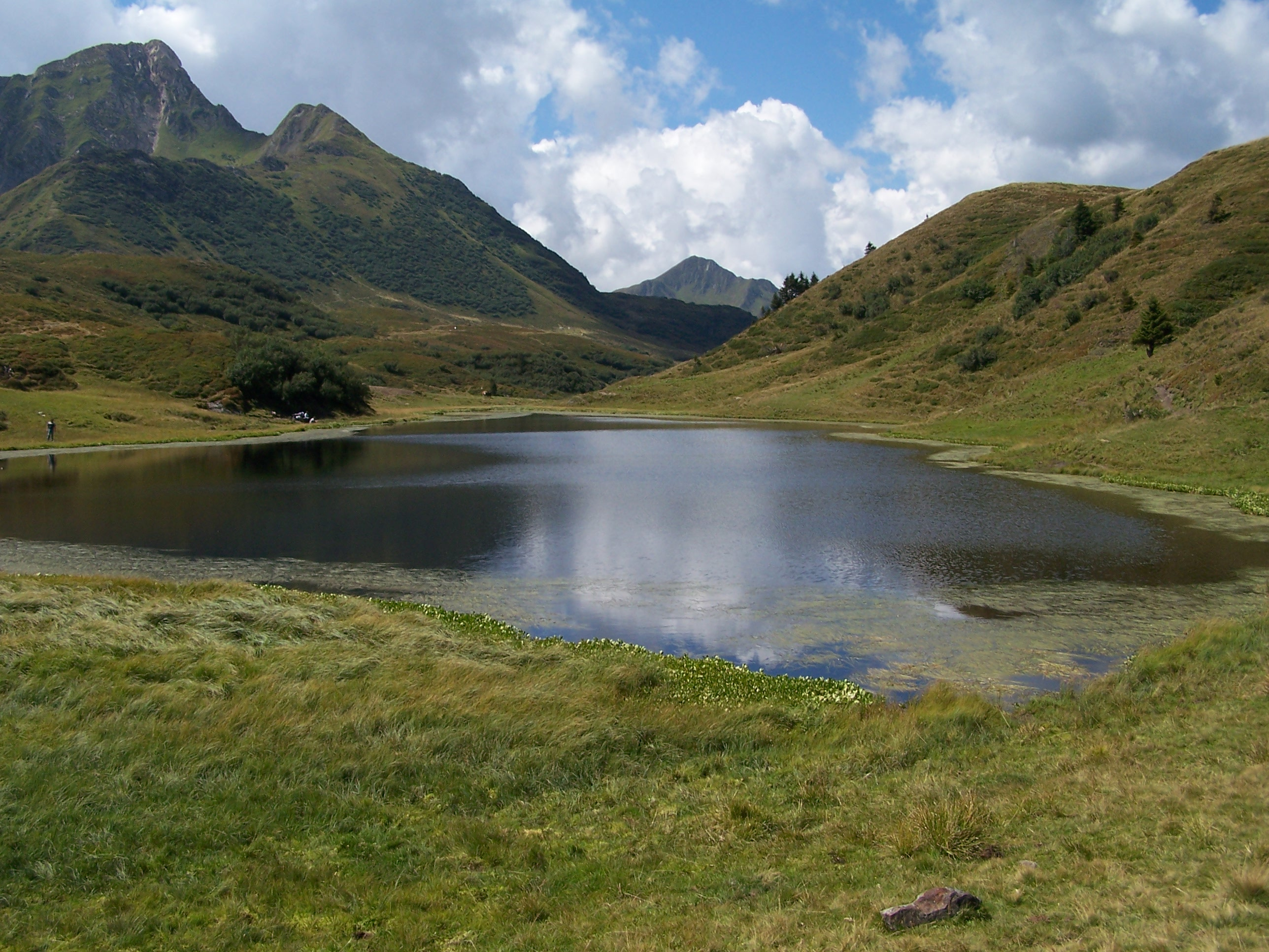 Zollner See, Kärnten, Österreich This media shows the natural monument in Carinthia with the ID He 15.